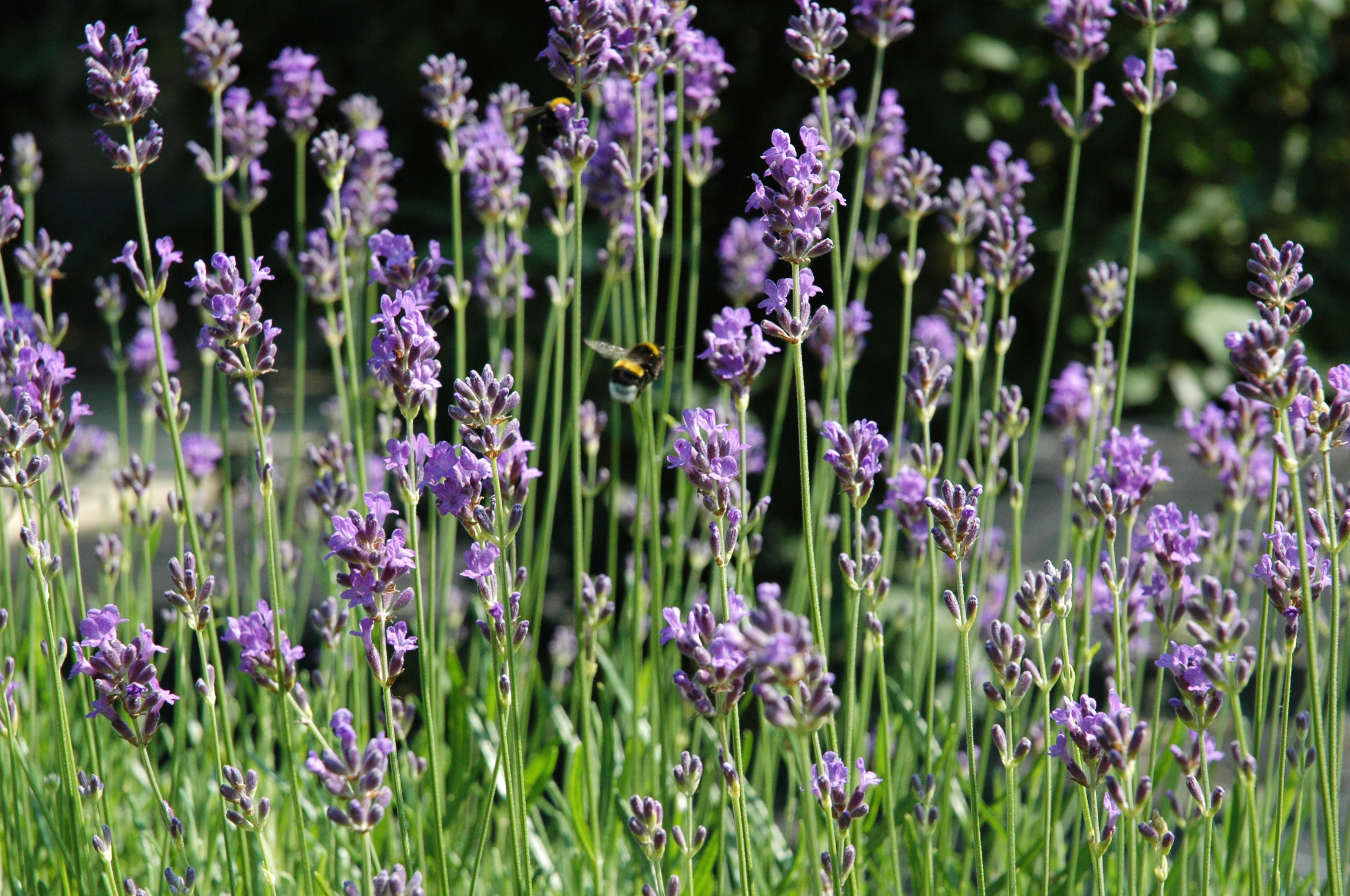 Lavendel; (en) Lavender